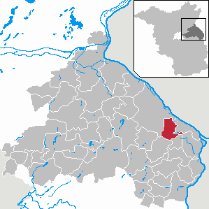 Zechin in Brandenburg (Country) - District Märkisch-Oderland